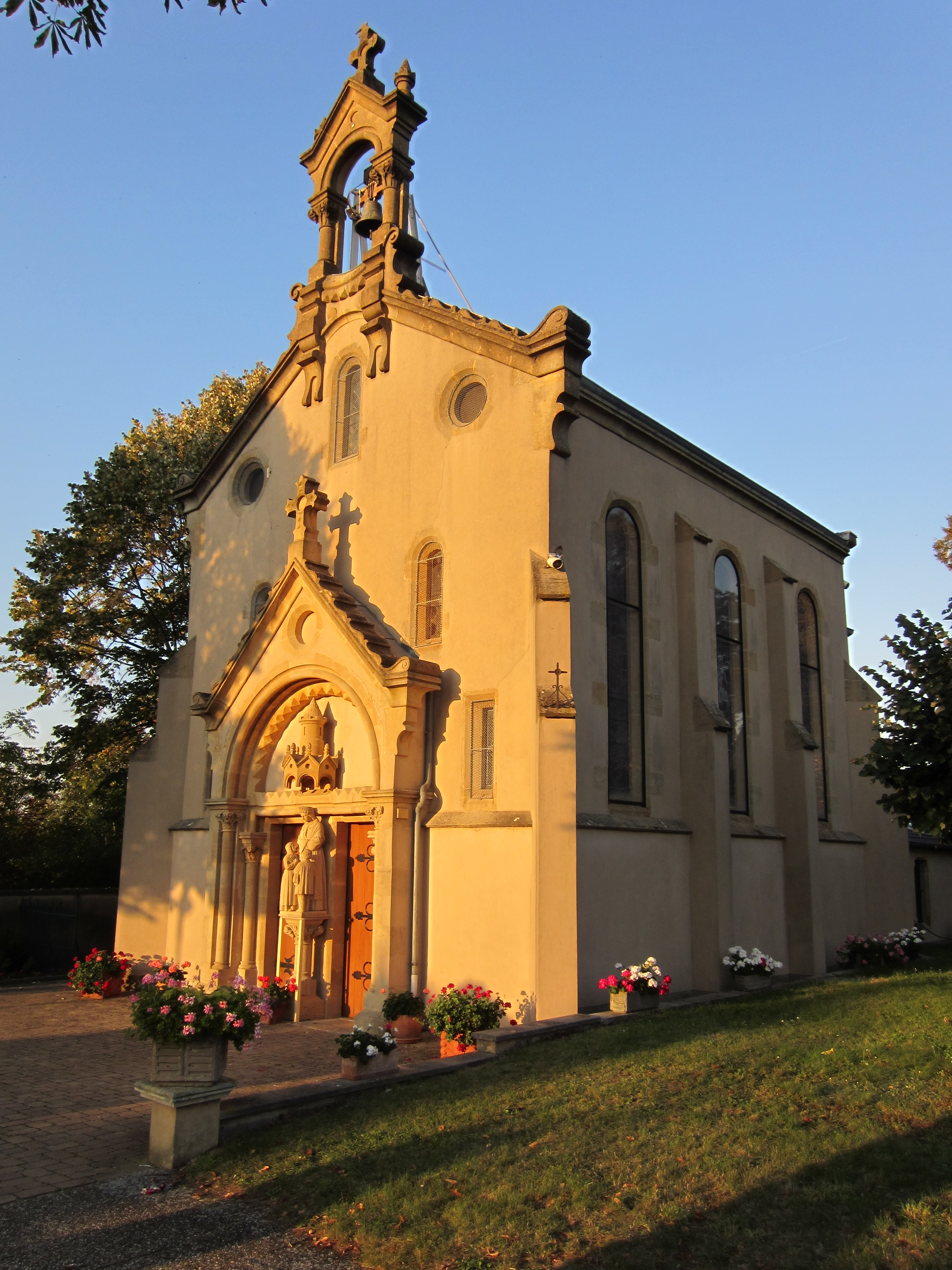 Description chapelle Notre-Dame-de-la-Salette à Villers-l'Orme chapelle Notre-Dame-de-la-Salette à Villers-l'Orme